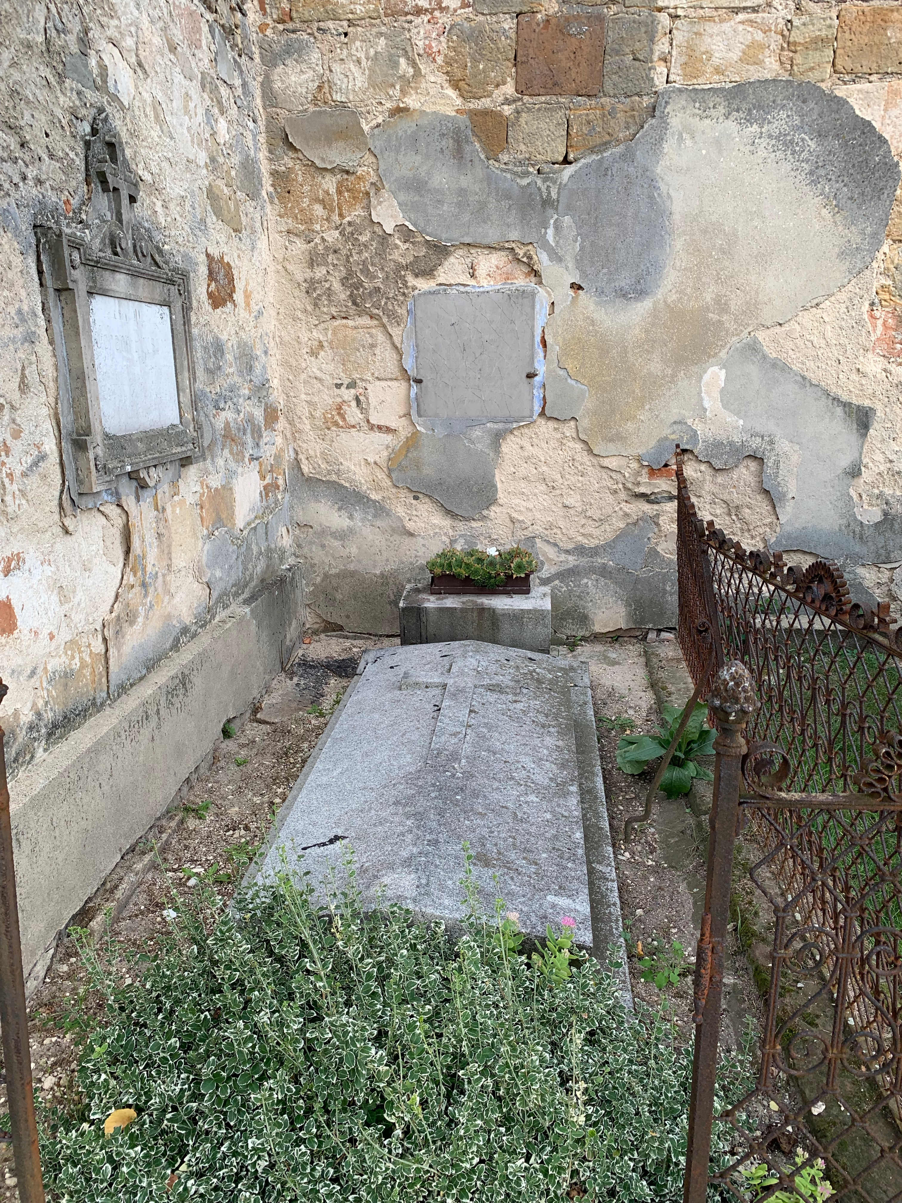 Kněžský hrob a náhrobní desky u kostela sv. Jiljí na Bezděze: Hier... P. Joseph Zimmerhackel, Pfarrverwesser in Bössig, gest. am 1. April 1848 a Ruhestätte des Monignores Johann Pruscha, Ehrendomherr, Bezirksvikär, Pfarrer in Schlossbössig, geb. 4. Juli 1810, gest. 21. Dezemb. 1895. Herr gib ihm die ewige Ruhe!